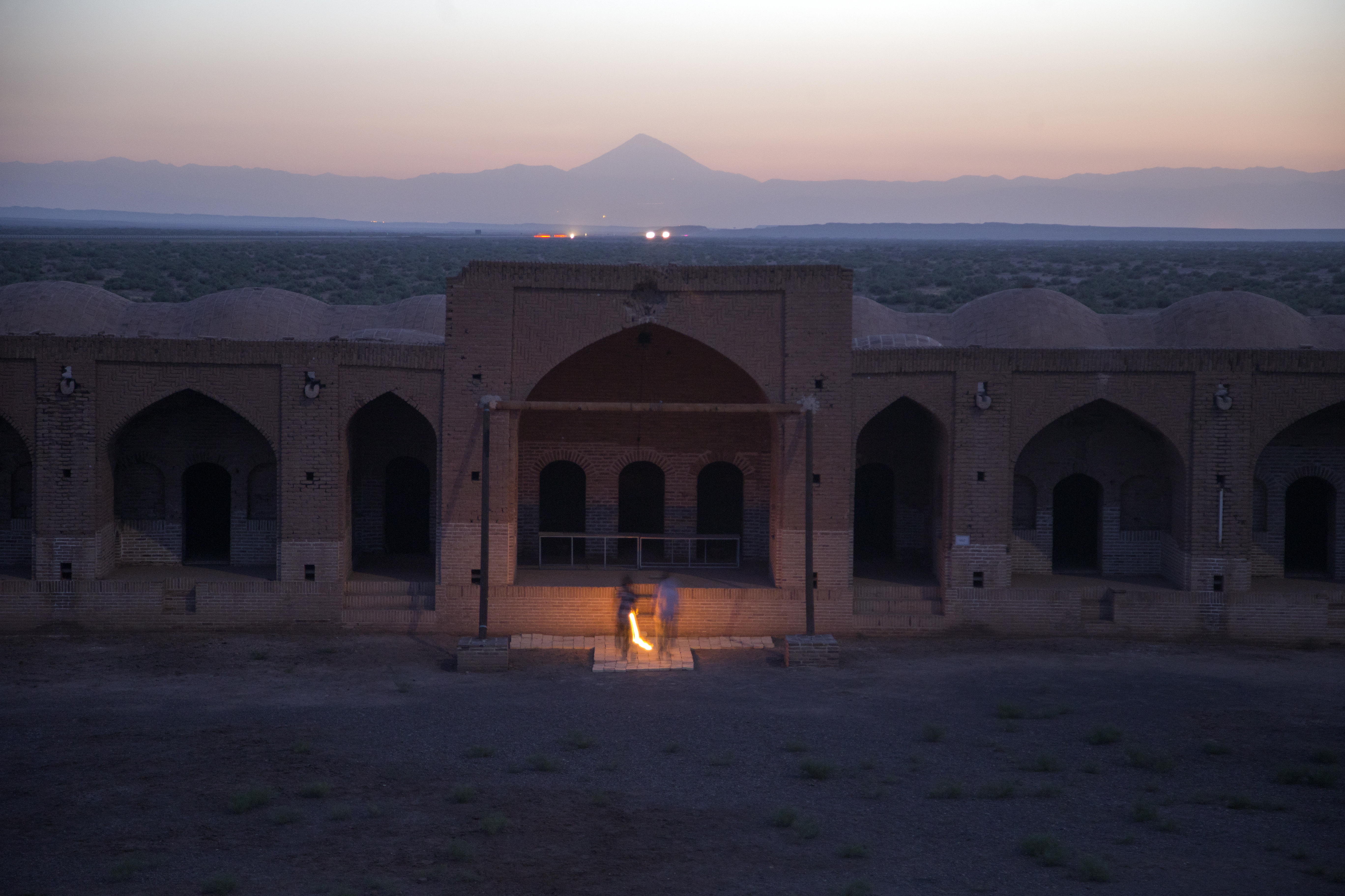 کاروانسرای دیر گچین یکی از بزرگ‌ترین کاروانسراهای ایران و دارای ویژگی‌های منحصربه‌فردی است که با بناهای مشابه، تفاوت دارد و باعث شده آن را مادر کاروانسراهای ایران بنامند. معماری این کاروانسرا مربوط به دوره ساسانی و صفوی است و در شهرستان قم، بخش مرکزی، ۸۰ کیلومتری شرق قم (کیلومتر ۶۰ بزرگراه گرمسار) و ۳۵ کیلومتری جنوب‌غربی ورامین واقع شده‌است. این اثر در تاریخ ۱ مهر ۱۳۸۲ با شمارهٔ ثبت ۱۰۴۰۸ به عنوان یکی از آثار ملی ایران به ثبت رسیده‌است